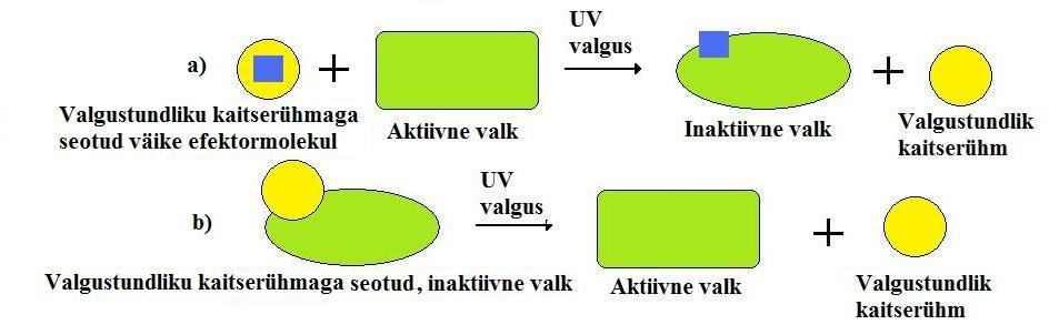 Joonis 2